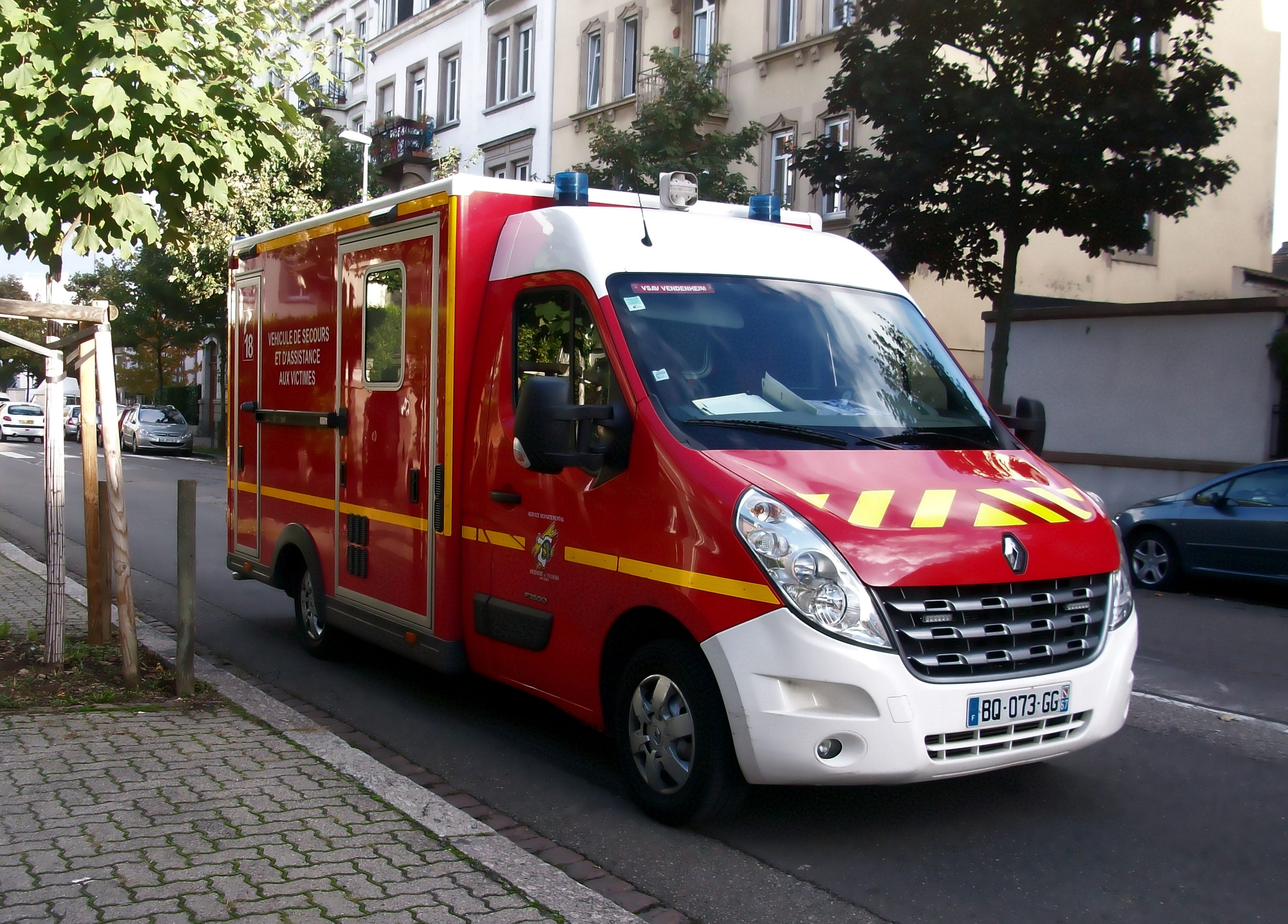 VSAV Renault Master du SDIS 67 à Strasbourg